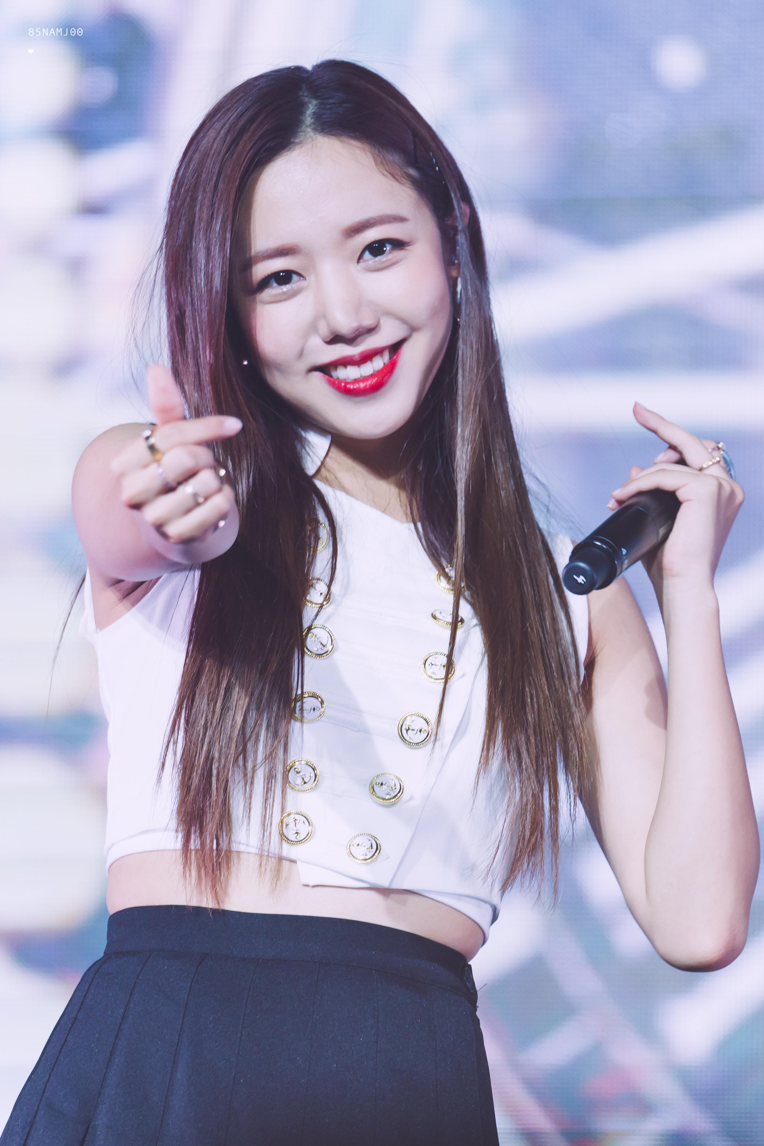 180929 타이페이 콘서트